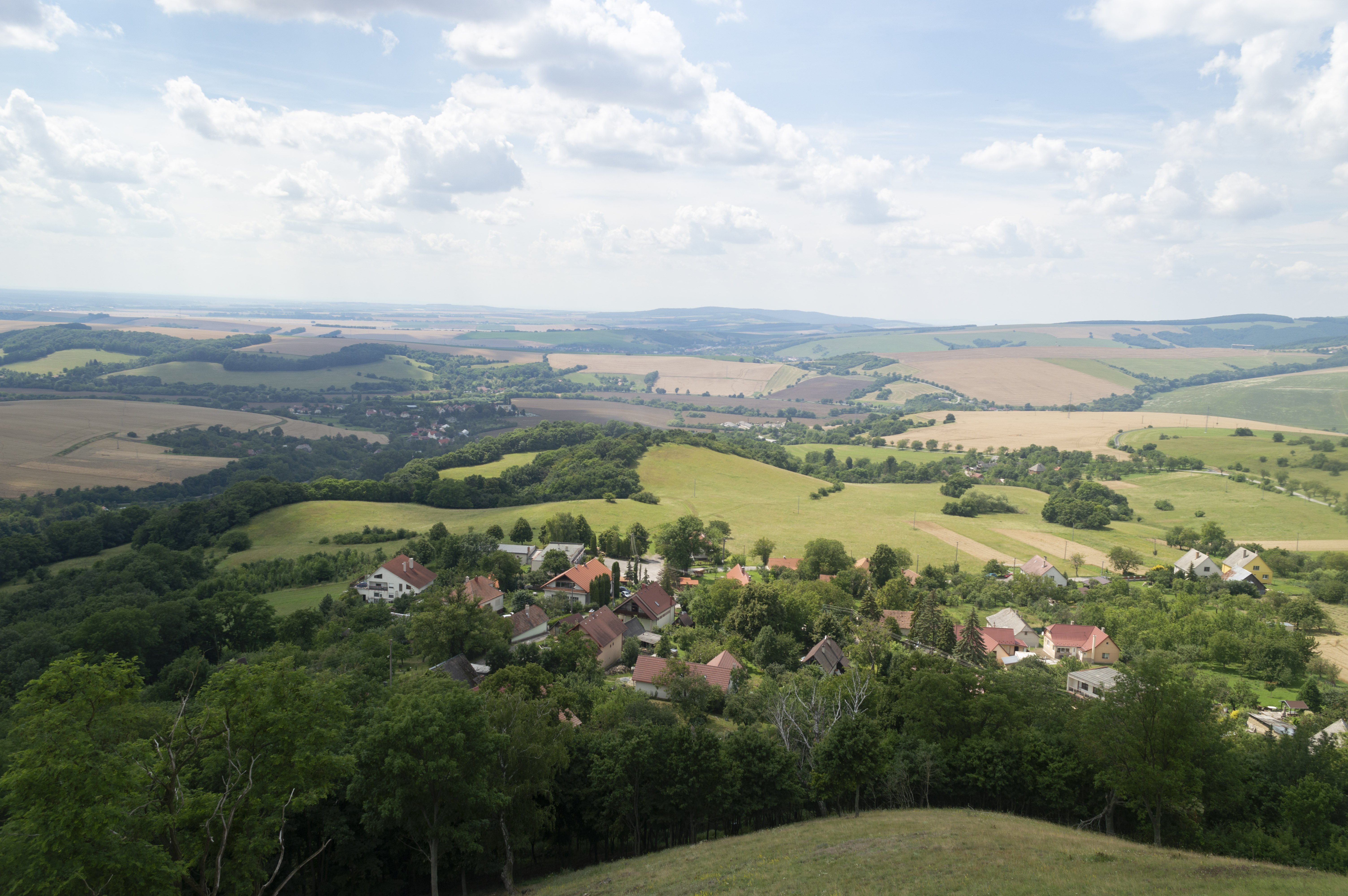 Hrad Branč, Slovensko